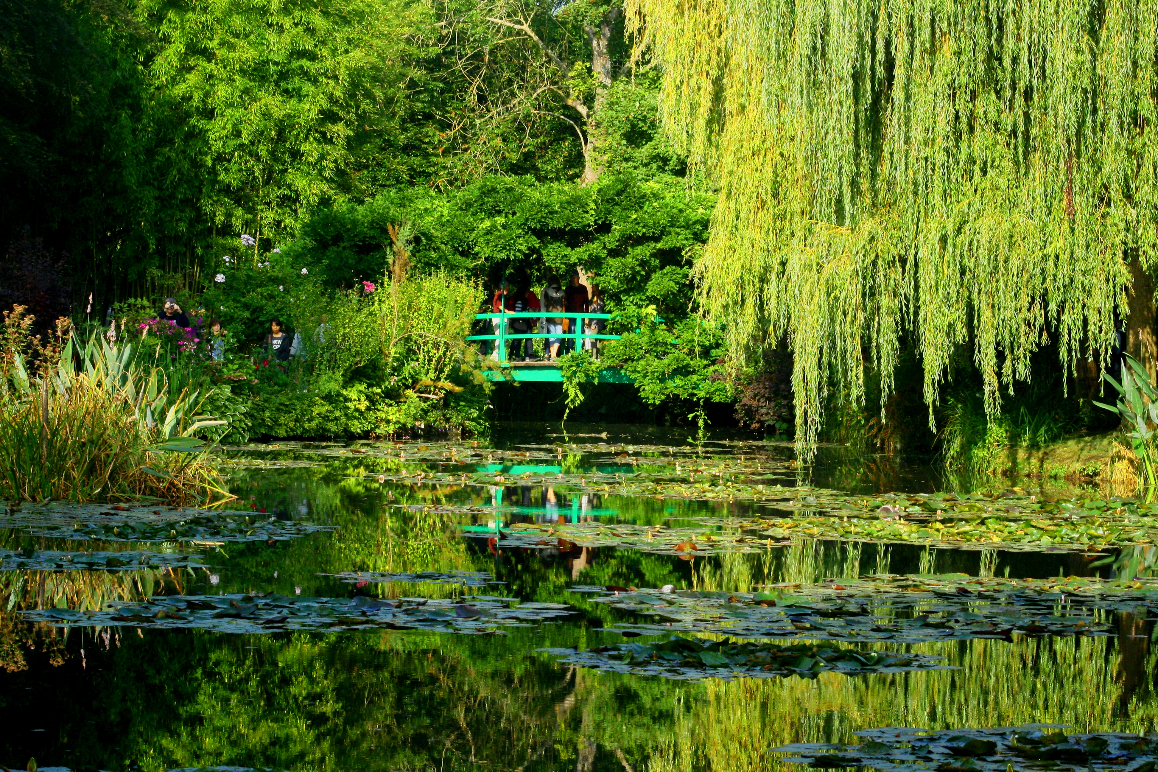 Fondation Claude Monet